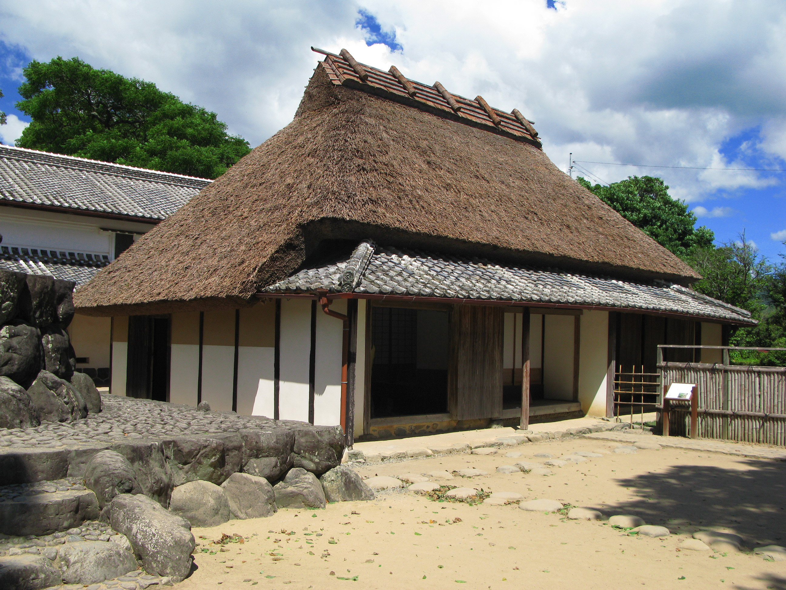 Lieu de naissance d'Iwasaki Yatarō (1835-1885), fondateur du groupe Mitsubishi.